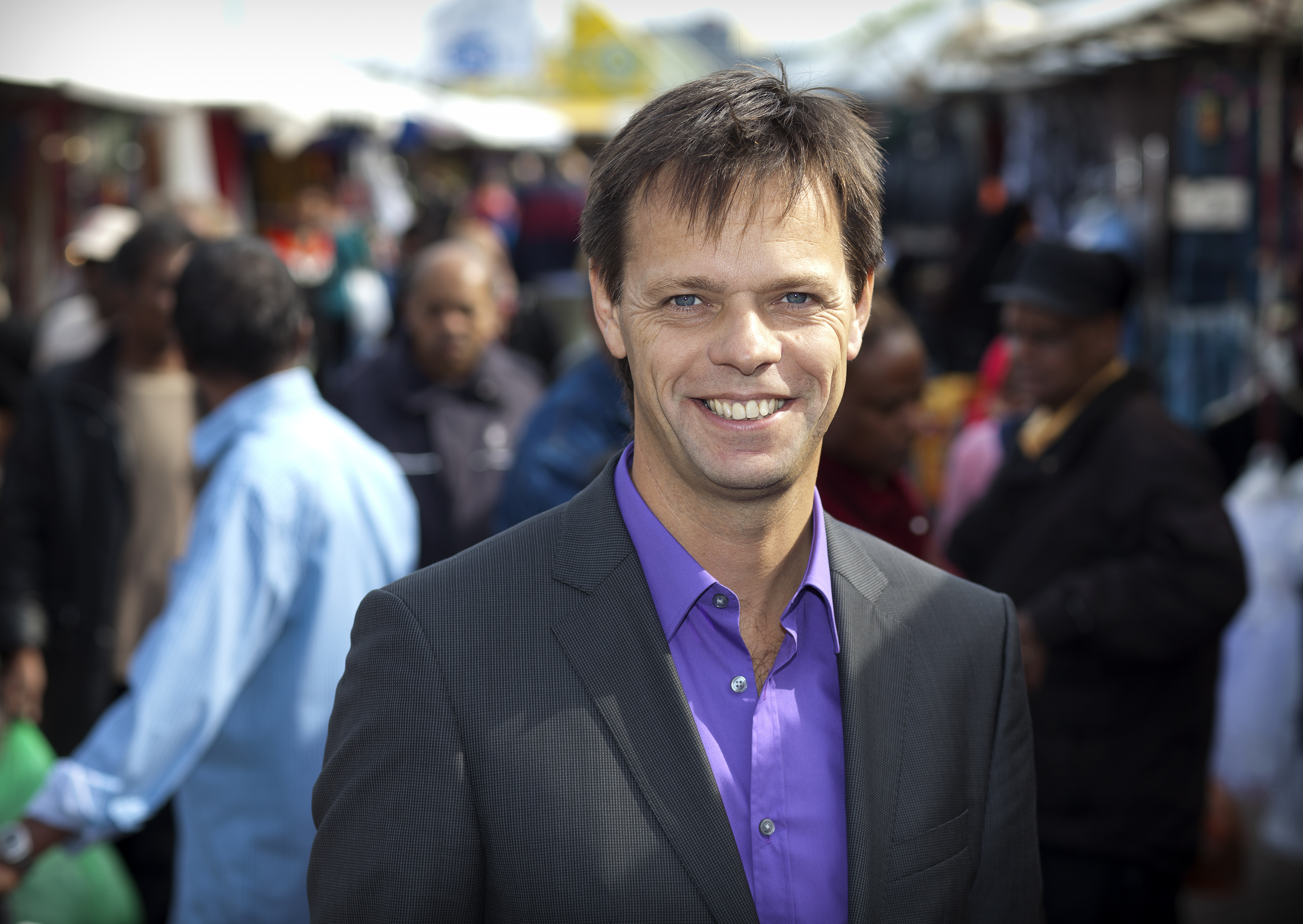 Marnix Norder op de Haagse Markt